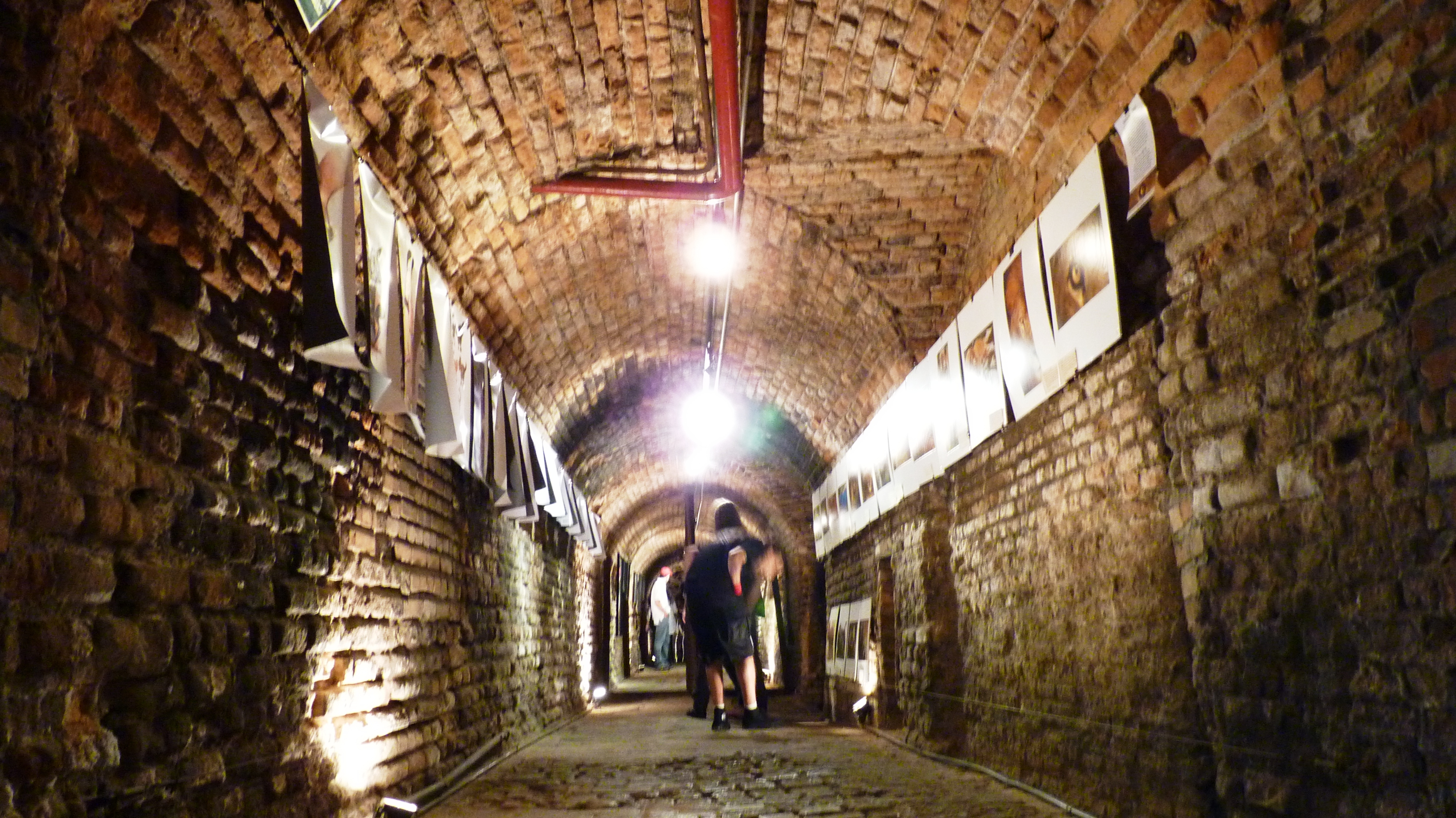 São Paulo